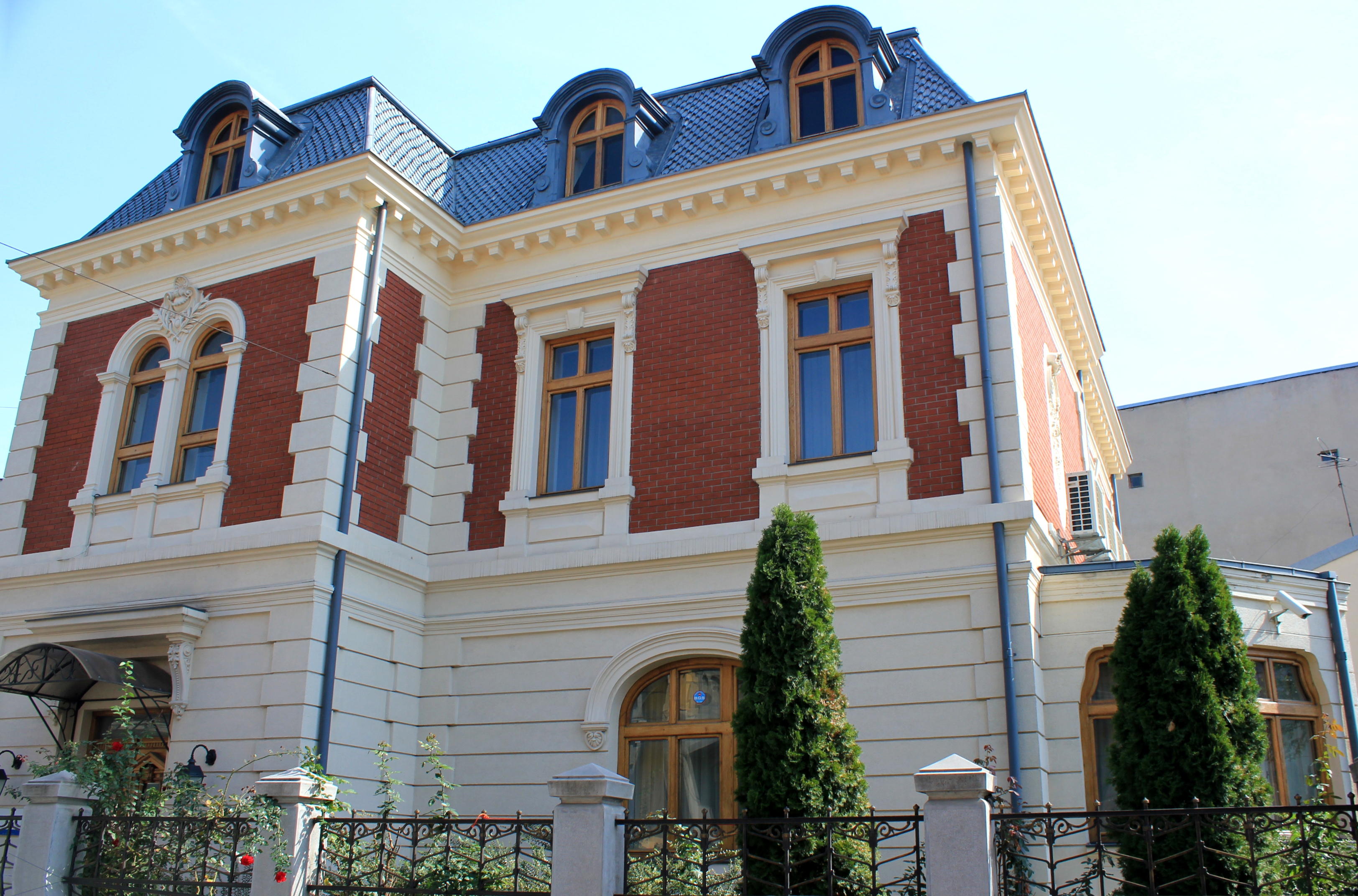 Casa Iuliu Zane str Silvestru 12